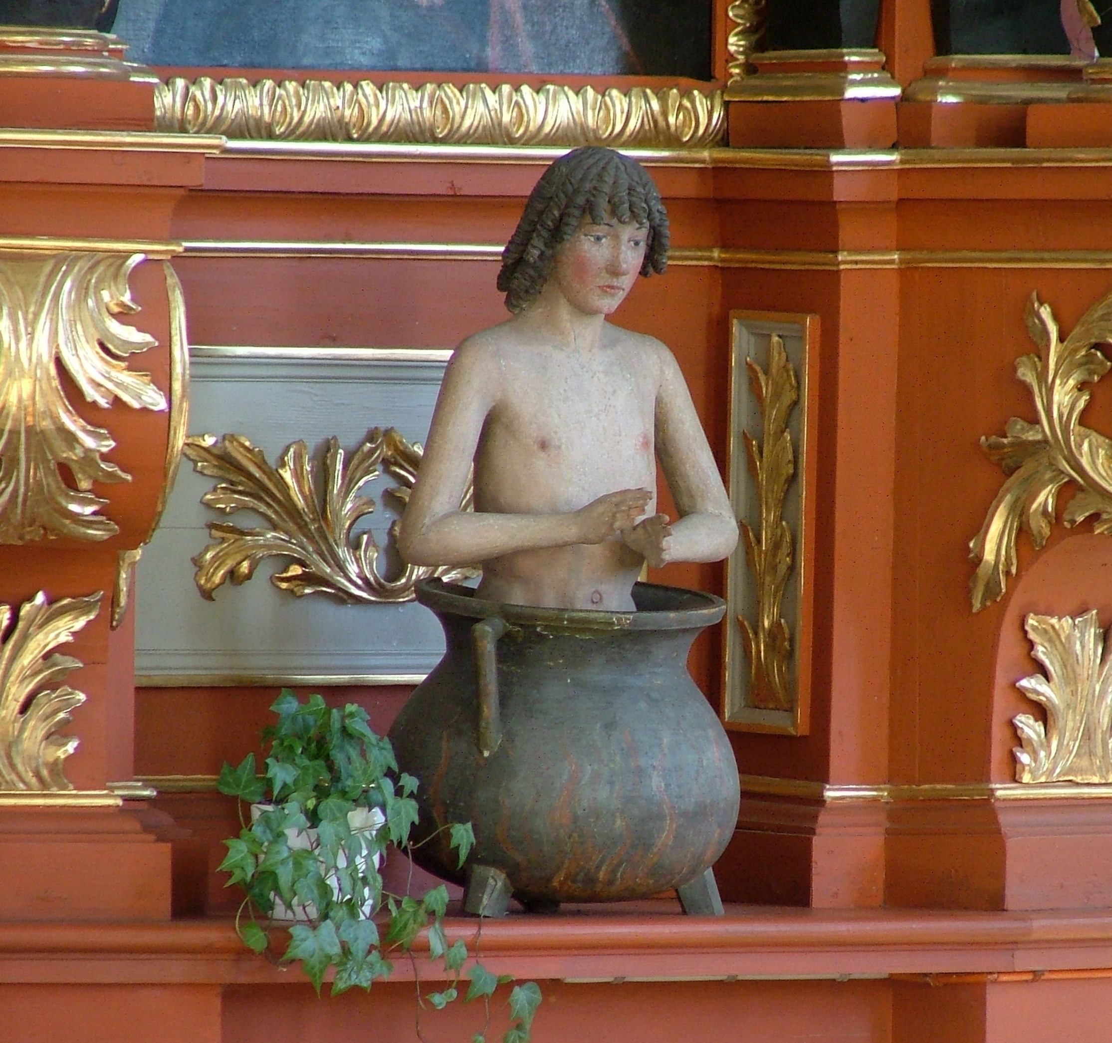 Märtyrer